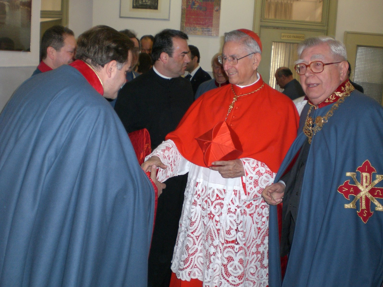 Chevaliers espagnols de l'Ordre sacré et militaire constantinien de Saint-Georges